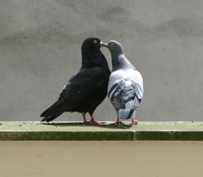 Parade nuptiale de deux pigeons biset (columba livia) dont un noir, XIe arrondissement de Paris.